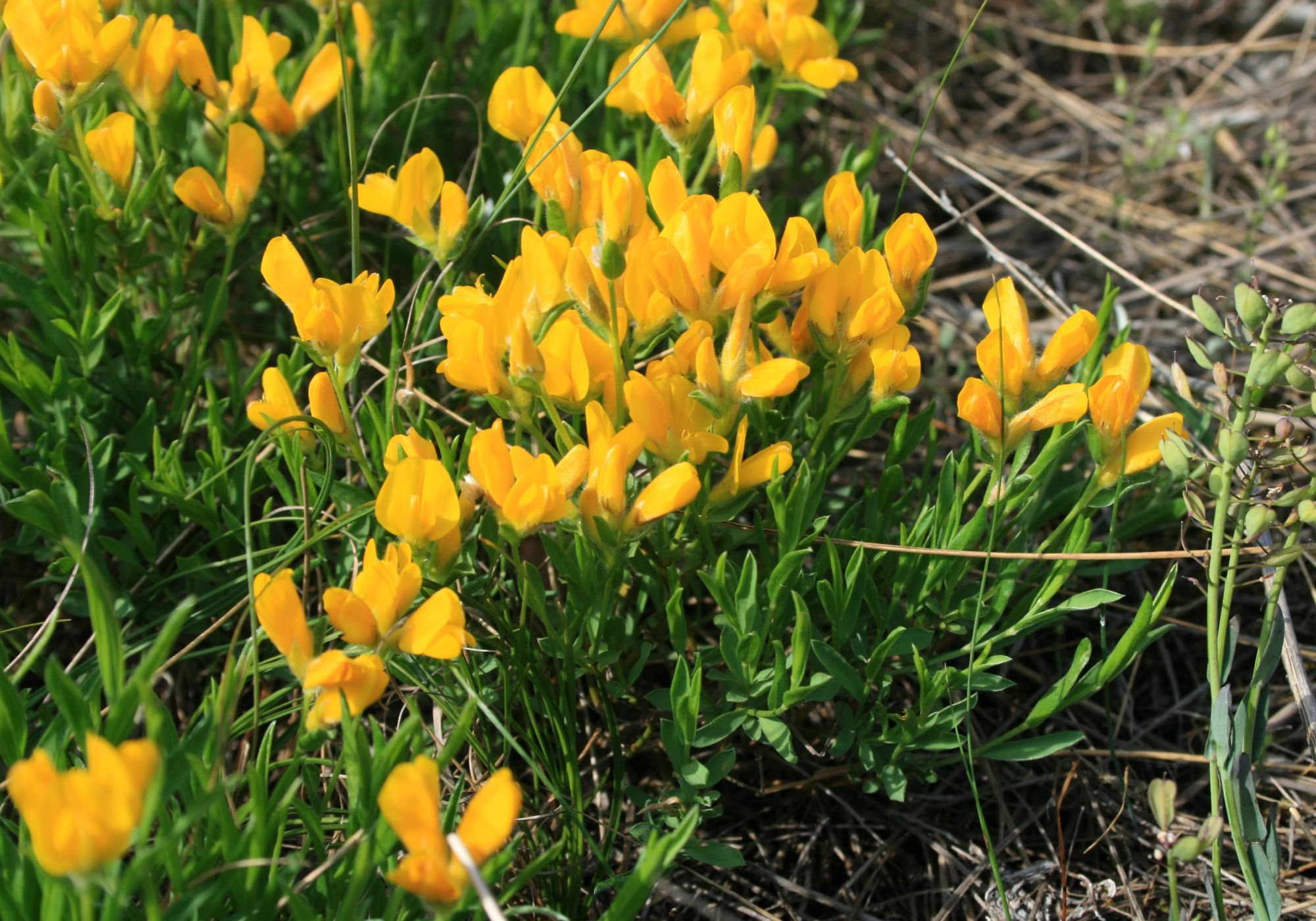 Genista sericea, Hülsenfrüchtler (Fabaceae), Schmetterlingsblütler (Faboideae) - Italien/Italia/Italy: Friuli-Venezia Giulia, Prov. Trieste, Monte Stena